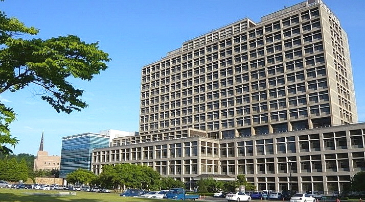 아주대 의대 & 병원